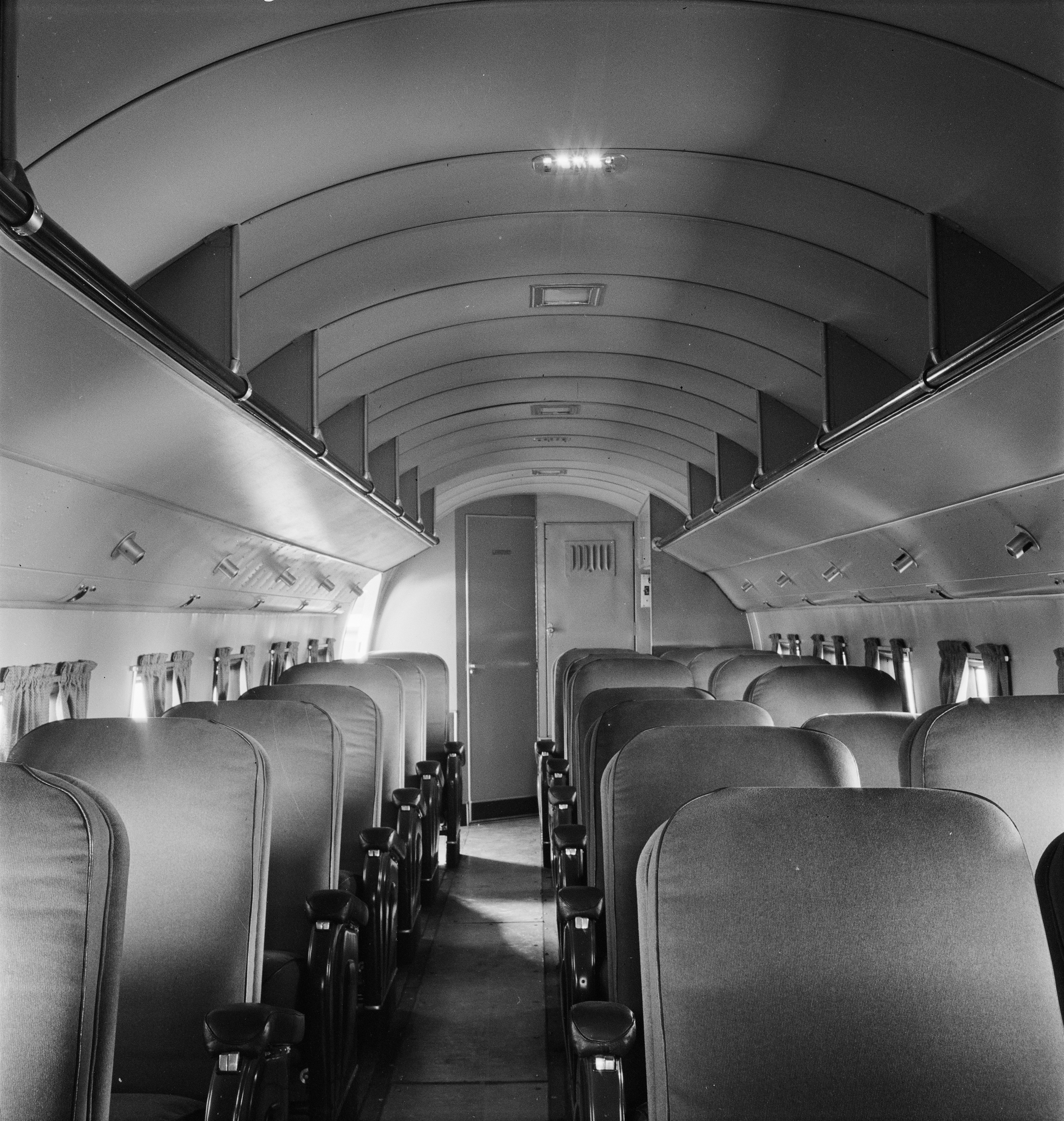 Kabine für 21 Passagiere. Zeitgenössische Bildbeschreibung des Swissair-Marketings: „Kabine Douglas DC-3 (ohne Personen), vom Pilotenstand aus gesehen. Die eleganten, bequemen Fauteuils sind verstellbar.“